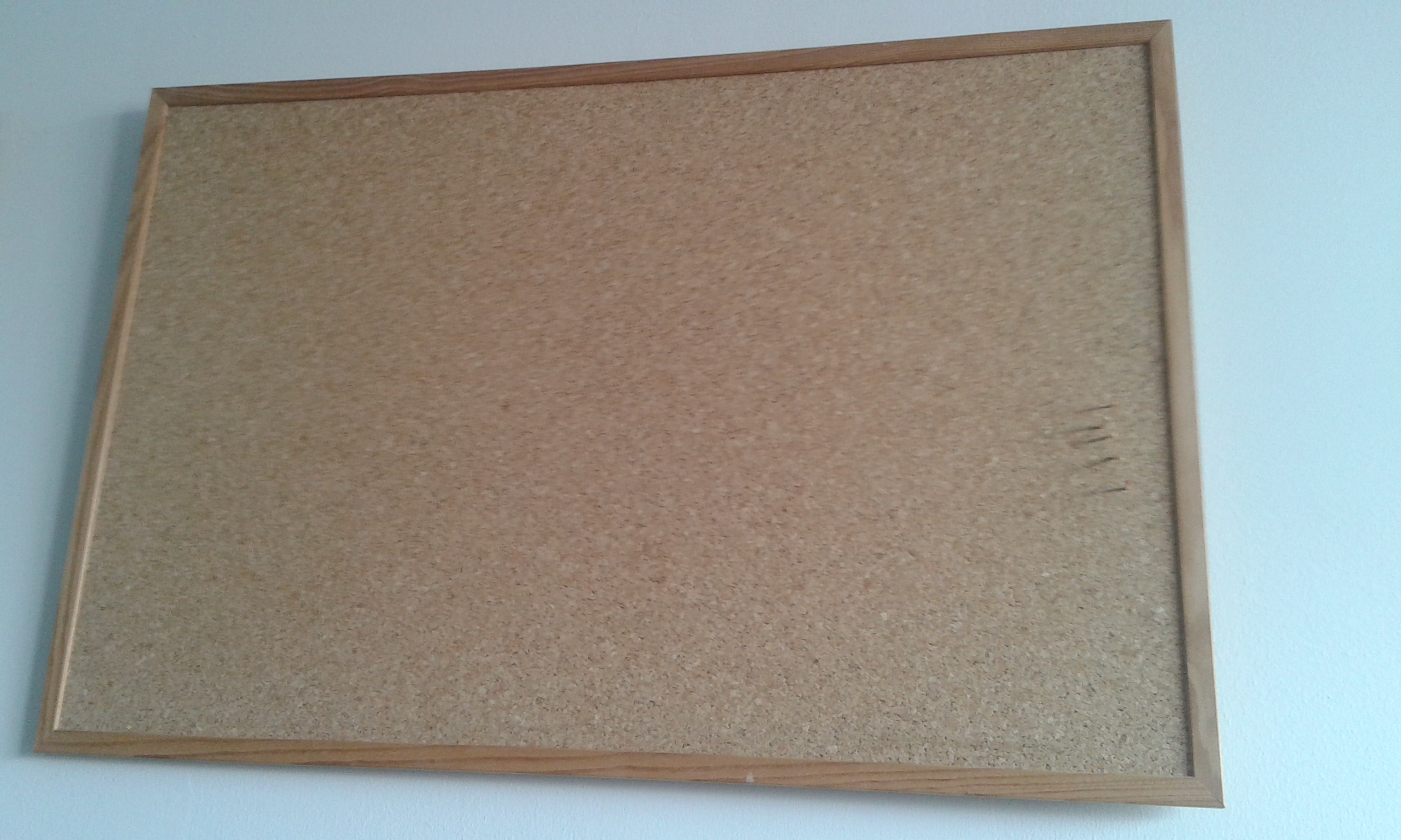 Tablero de corcho de uso académico.